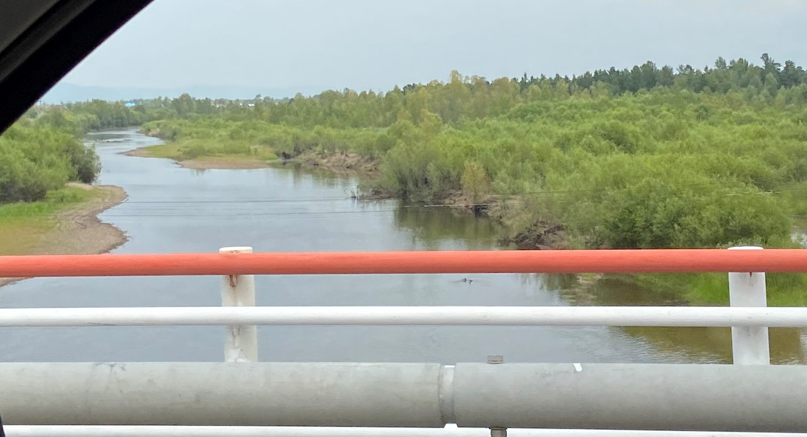 River view from the bridge